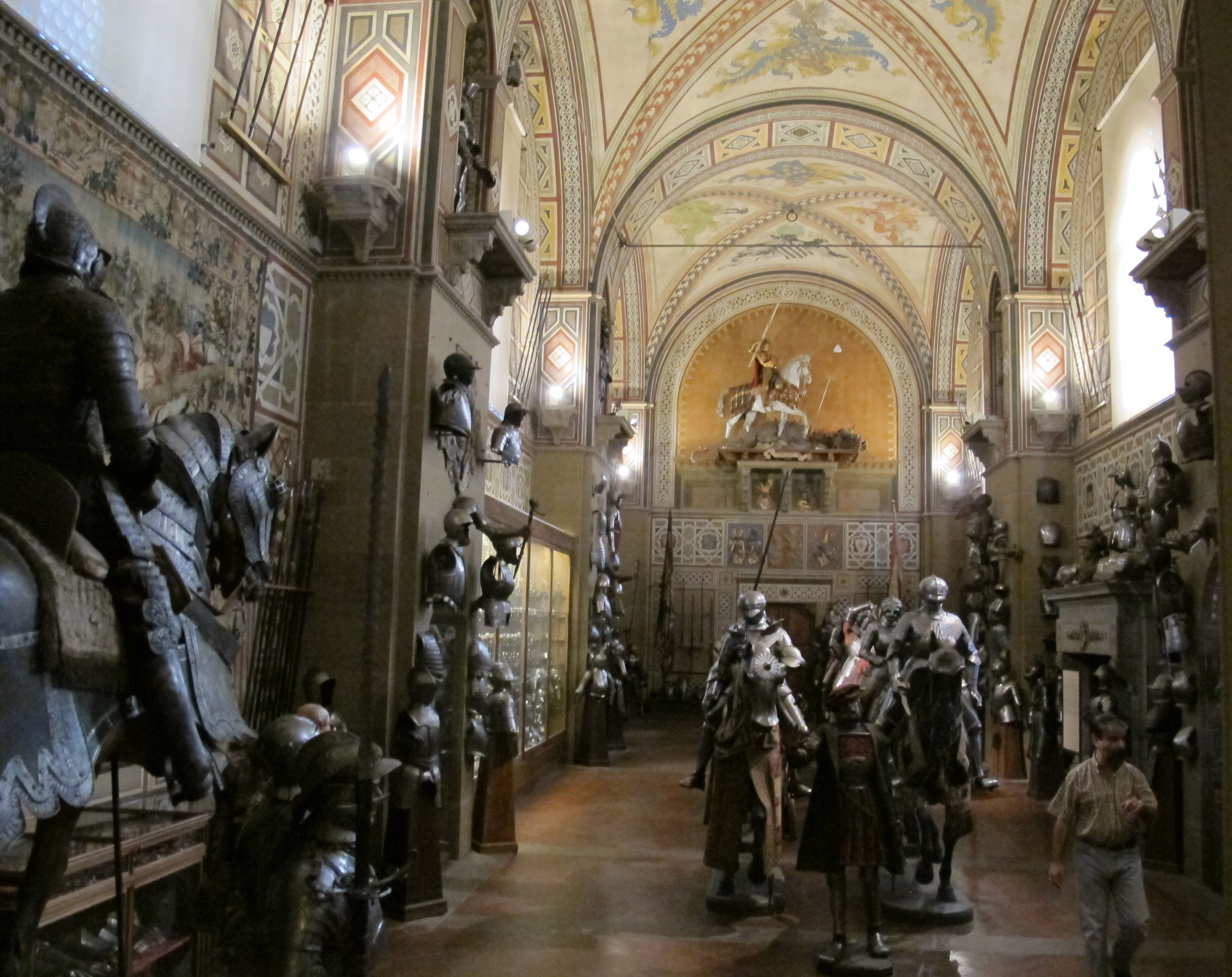 Museo stibbert, interno